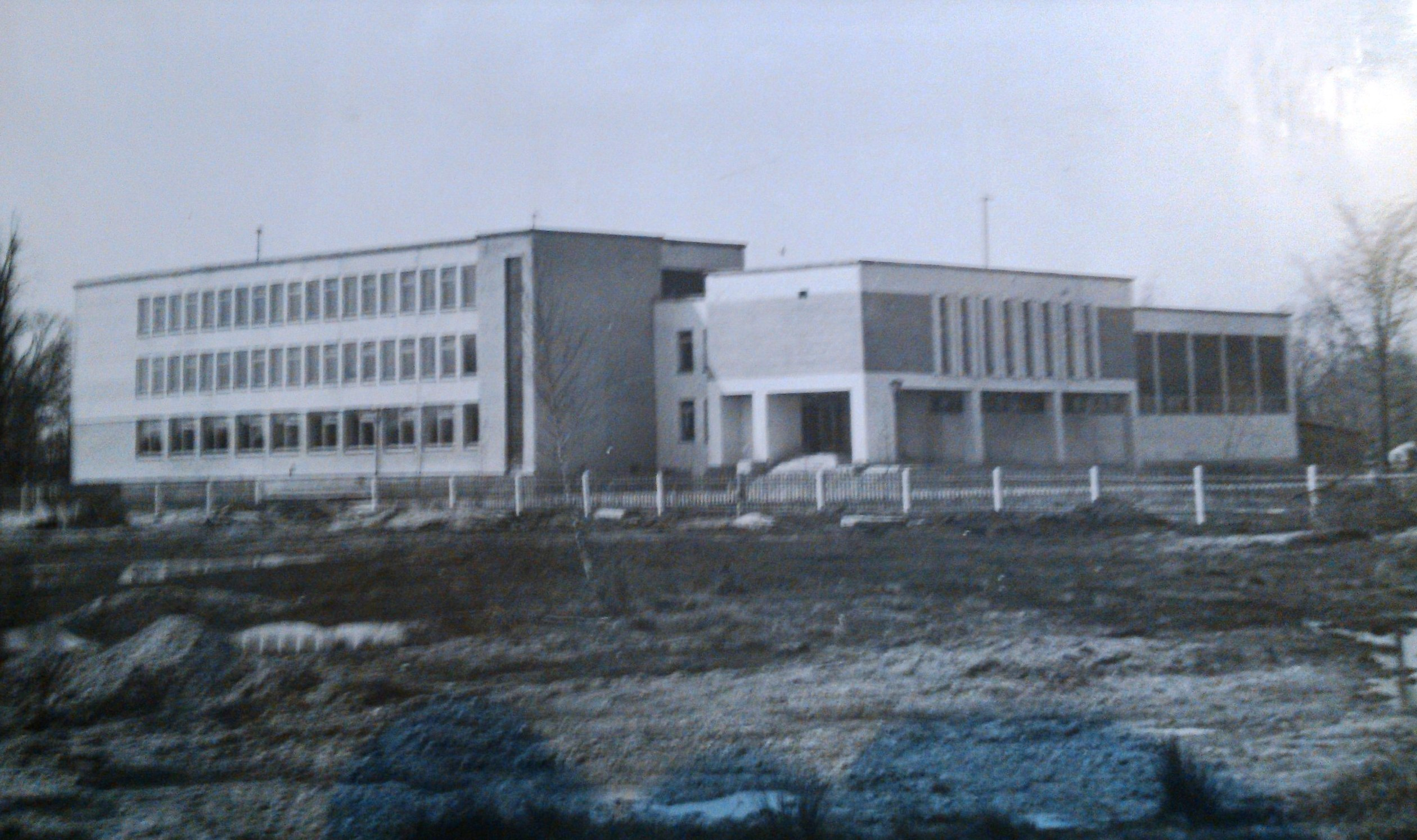 Заречковская средняя школа